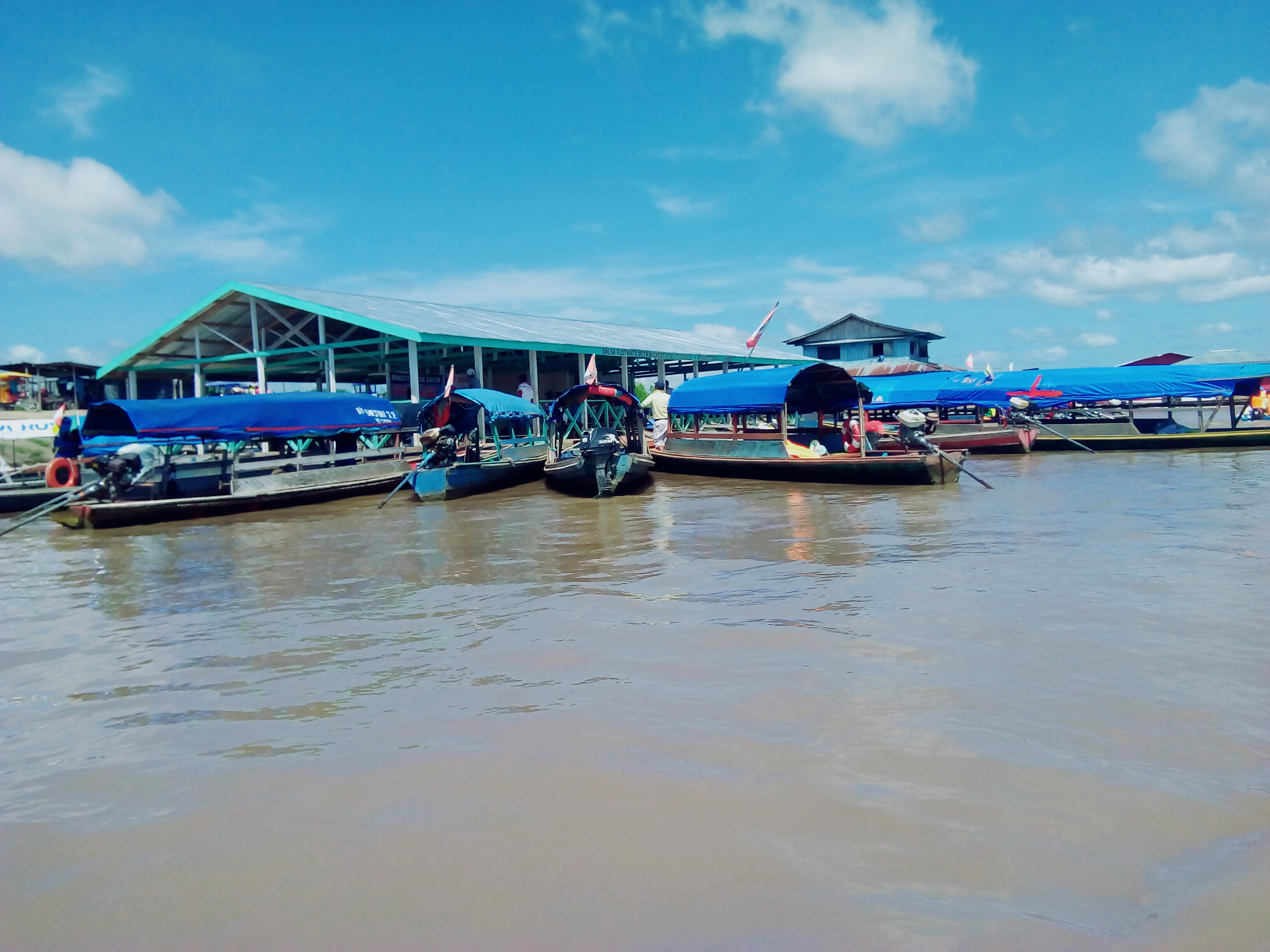 Puerto principal balsa de los transportistas